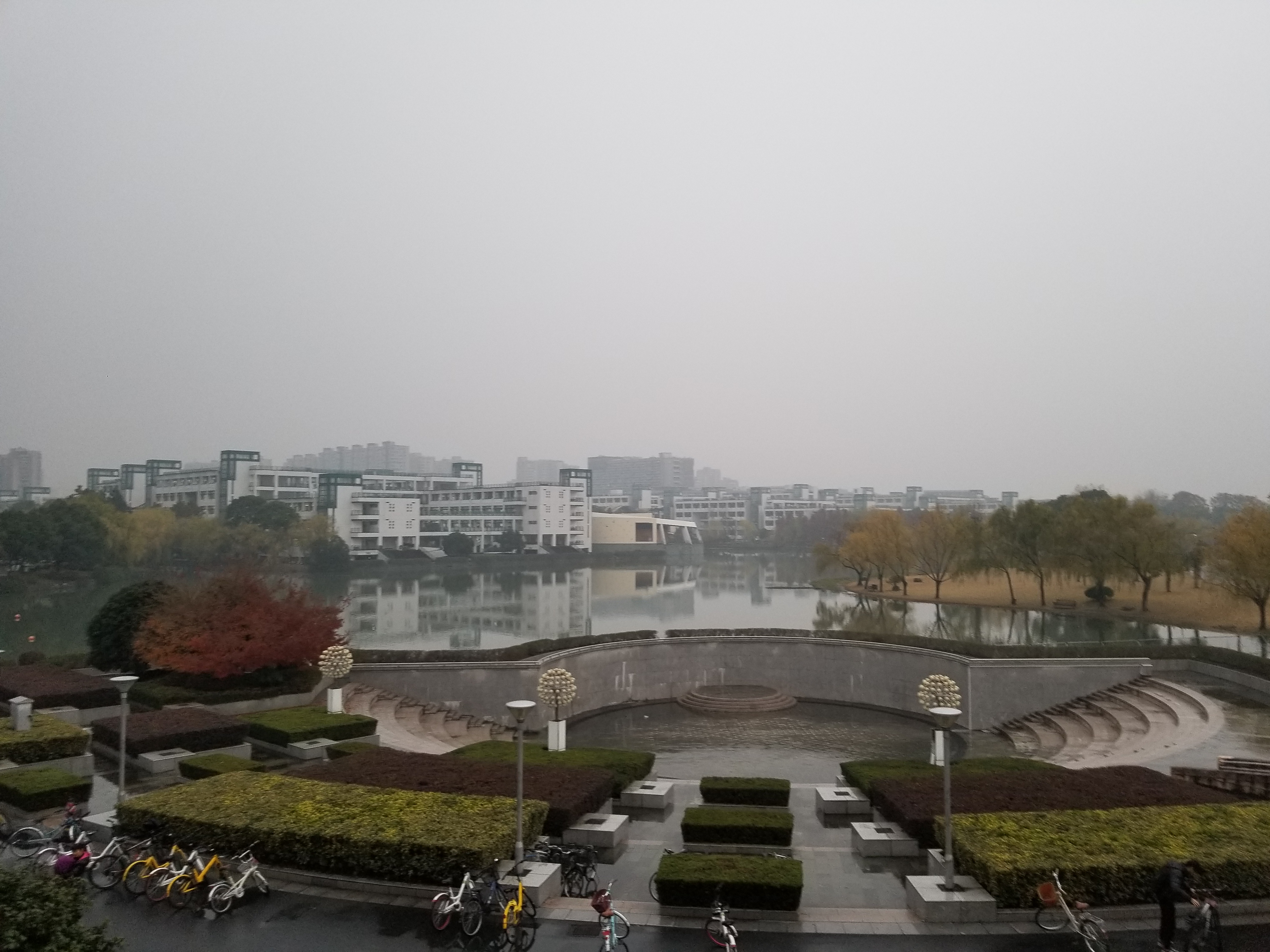 从临湖餐厅向外眺望（浙大紫金港校区）